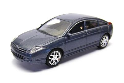 Eigengemaakte foto + bewerking. Terug te vinden op de website Categorie:Afbeelding modelbouw